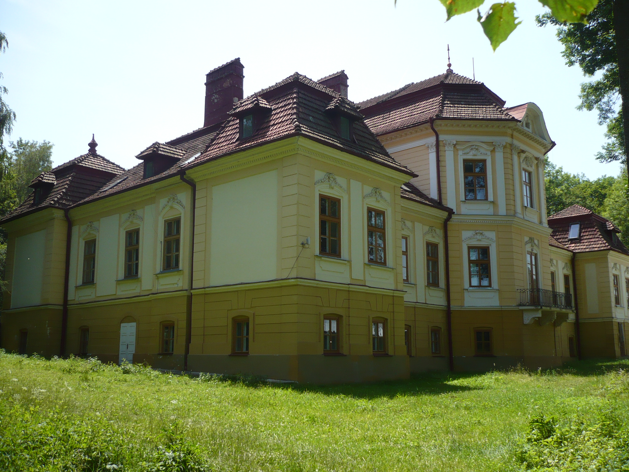 Pałac. Lubień Wielki